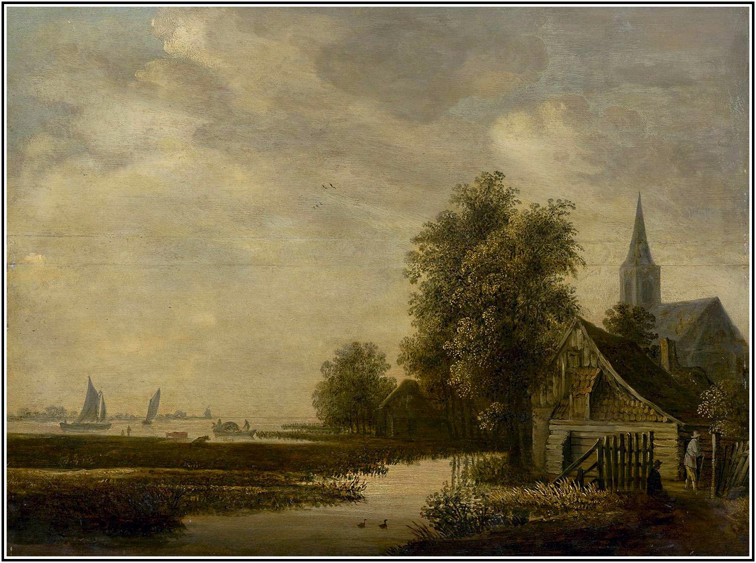 Кнейф, Ваутер. 1605/07-1694. Речной пейзаж.